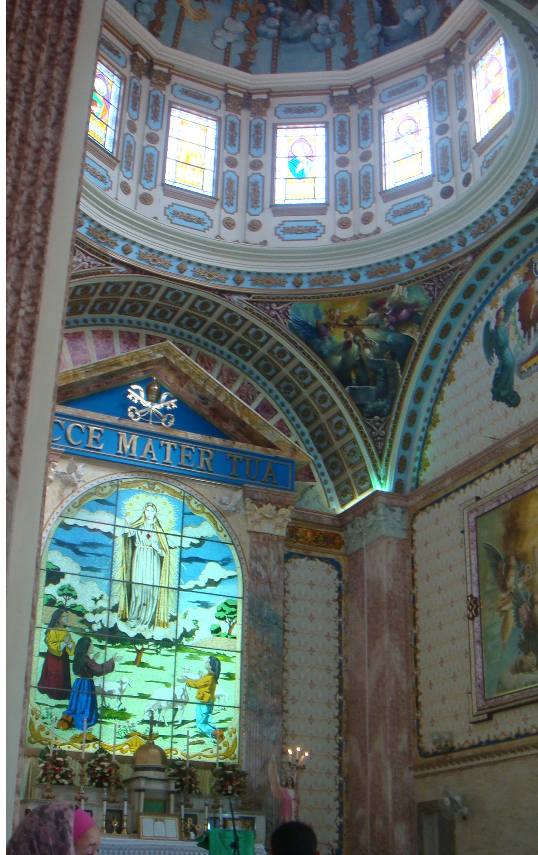 Visão panorâmica do Presbitério da Igreja Principal de Campos, da Administração São João Vianney.